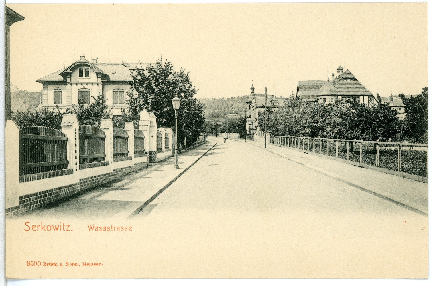 Serkowitz; Wasastraße This postcard is from publisher Brück & Sohn in Meißen ( postcard has a unique number 03590 and is available in a higher resolution at the publisher. This images was uploaded in a cooperation project between Wikipedians and the publisher.